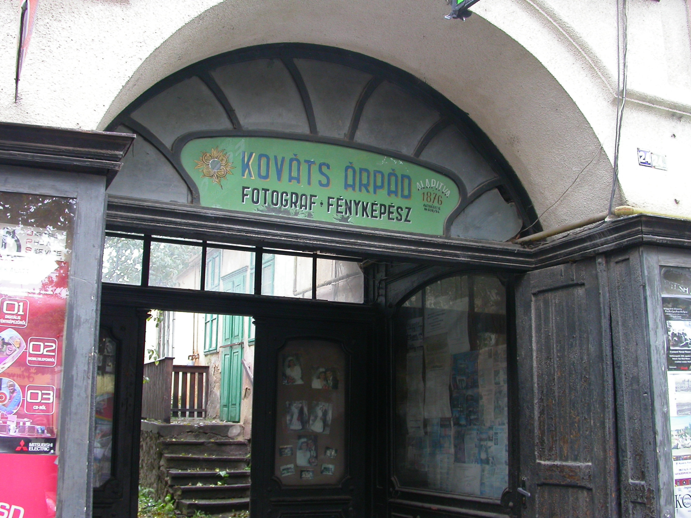 Atelierul fotografic Kovács, cu vitrine originare, 1873, înc.sec. XX